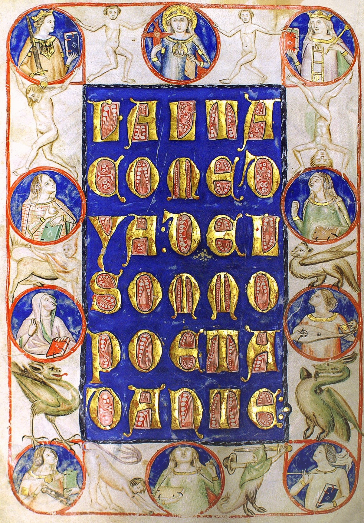 Codex Altonensis: Dantes Comedya. Titel: L ALTA COMEDYA:DEL SOMMO POETA DANTE